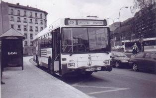 Unidad 1840 de (TCSA) pintada de Bilbobus, con el antiguo esquema blanco con rayas rojas y letras azules; el vehículo es un Mercedes-Benz O405, puesto en marcha en 1988, finalizando sus servicios en TCSA entre los años 2004 y 2006.